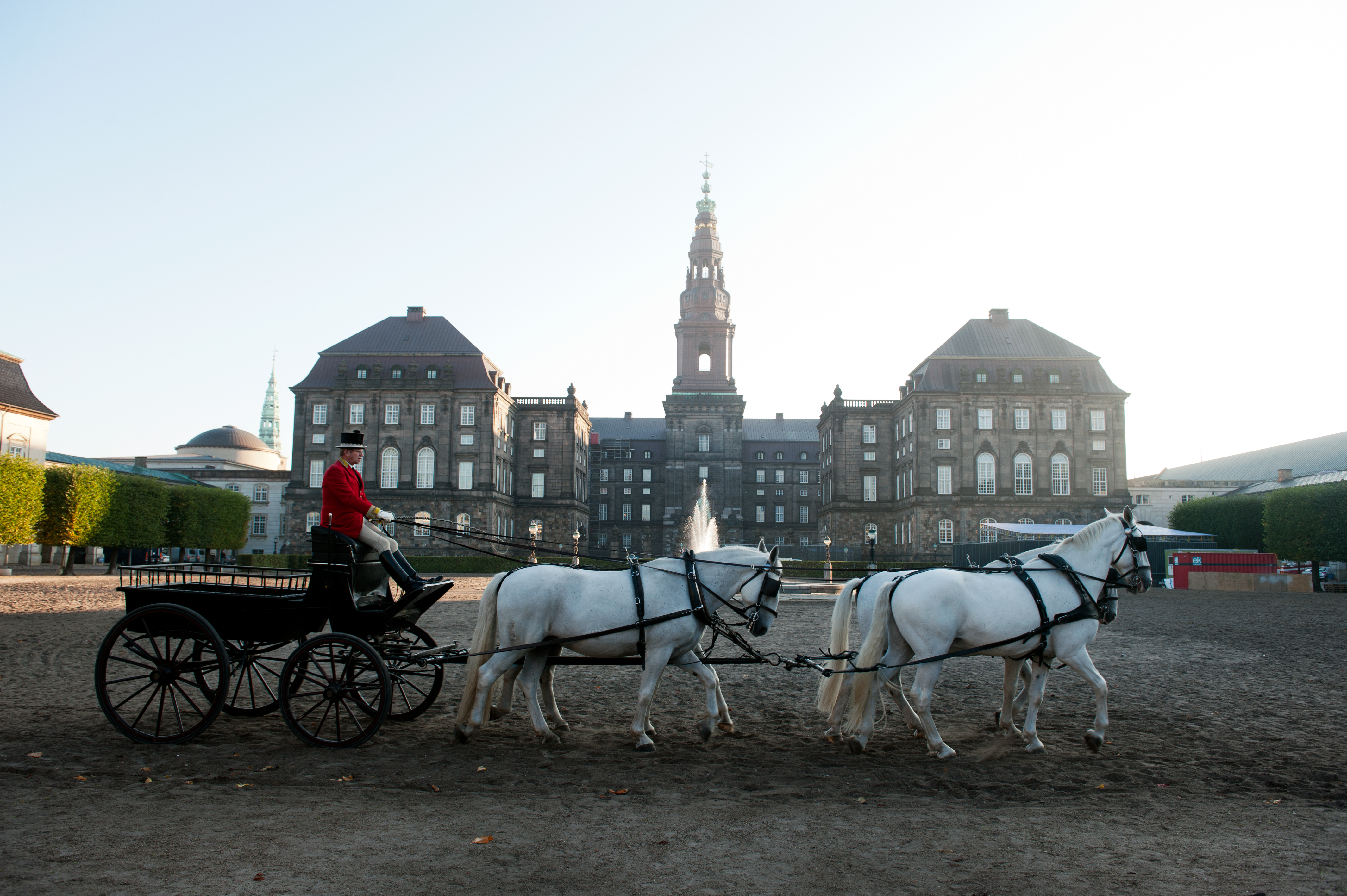 Christiansborg Köpenhamn Danmark Data-uid: 95625c8c-4b02-40f0-9a2d-e90c2d7da363